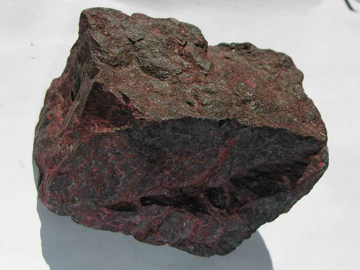 Cinabrio